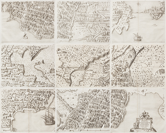 Cartografia di Siracusa greca. Stampata per la prima volta a Napoli nel 1613.